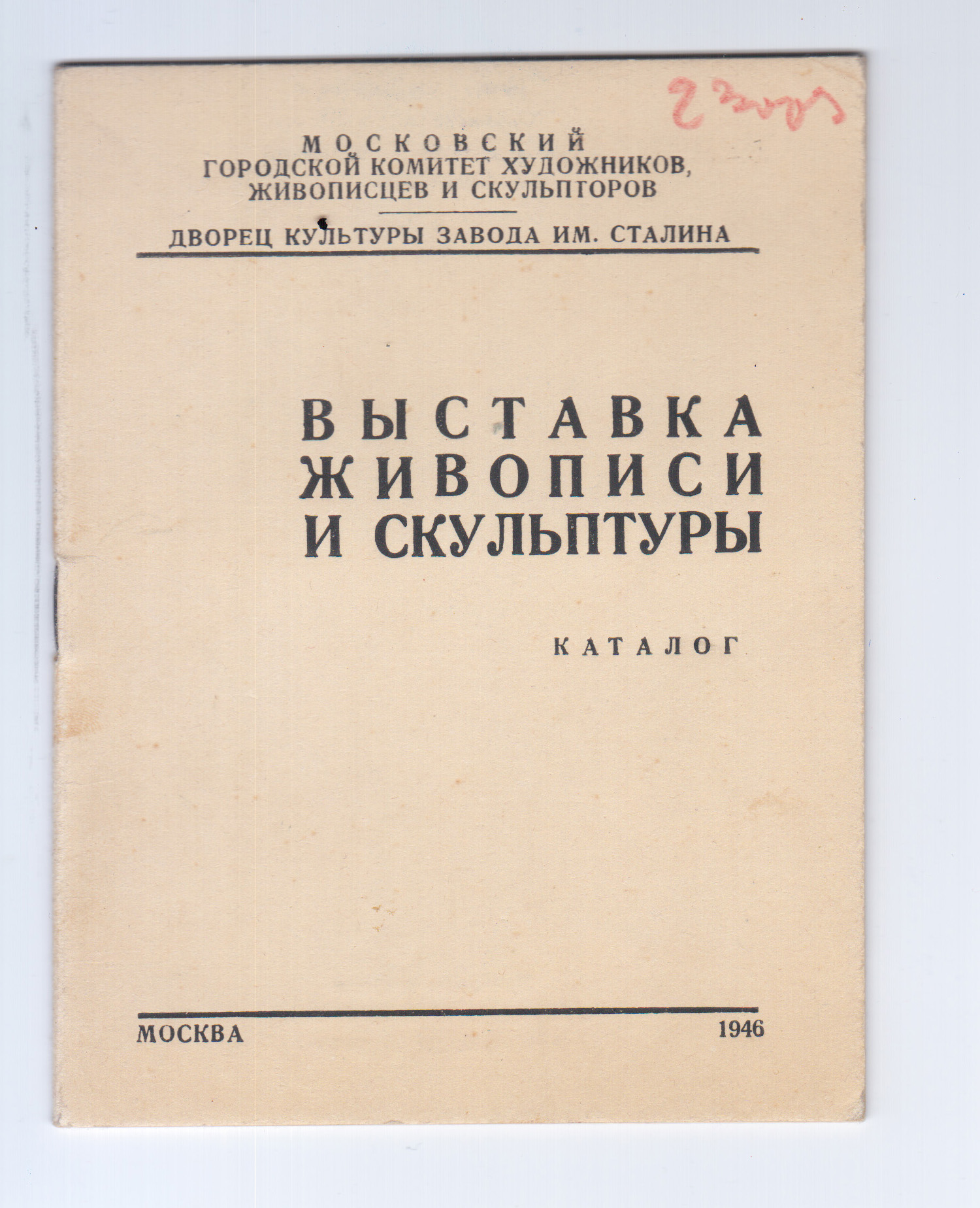 Обложка каталога Выставки живописи и скульптуры в Москве, 1946